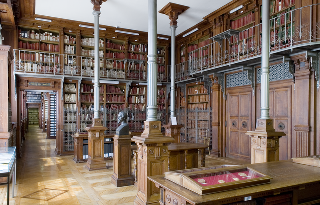 Vue d'une partie des Grands Dépôts des Archives nationales, et notamment de l'armoire de fer (fermée par sa porte en bois).